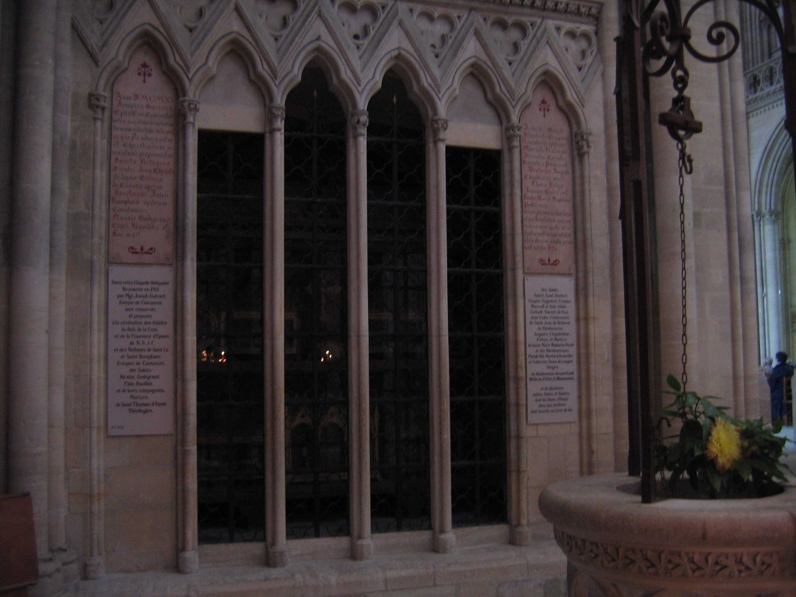 chapelle de l'abbaye de Saint Sauveur le Vicomte